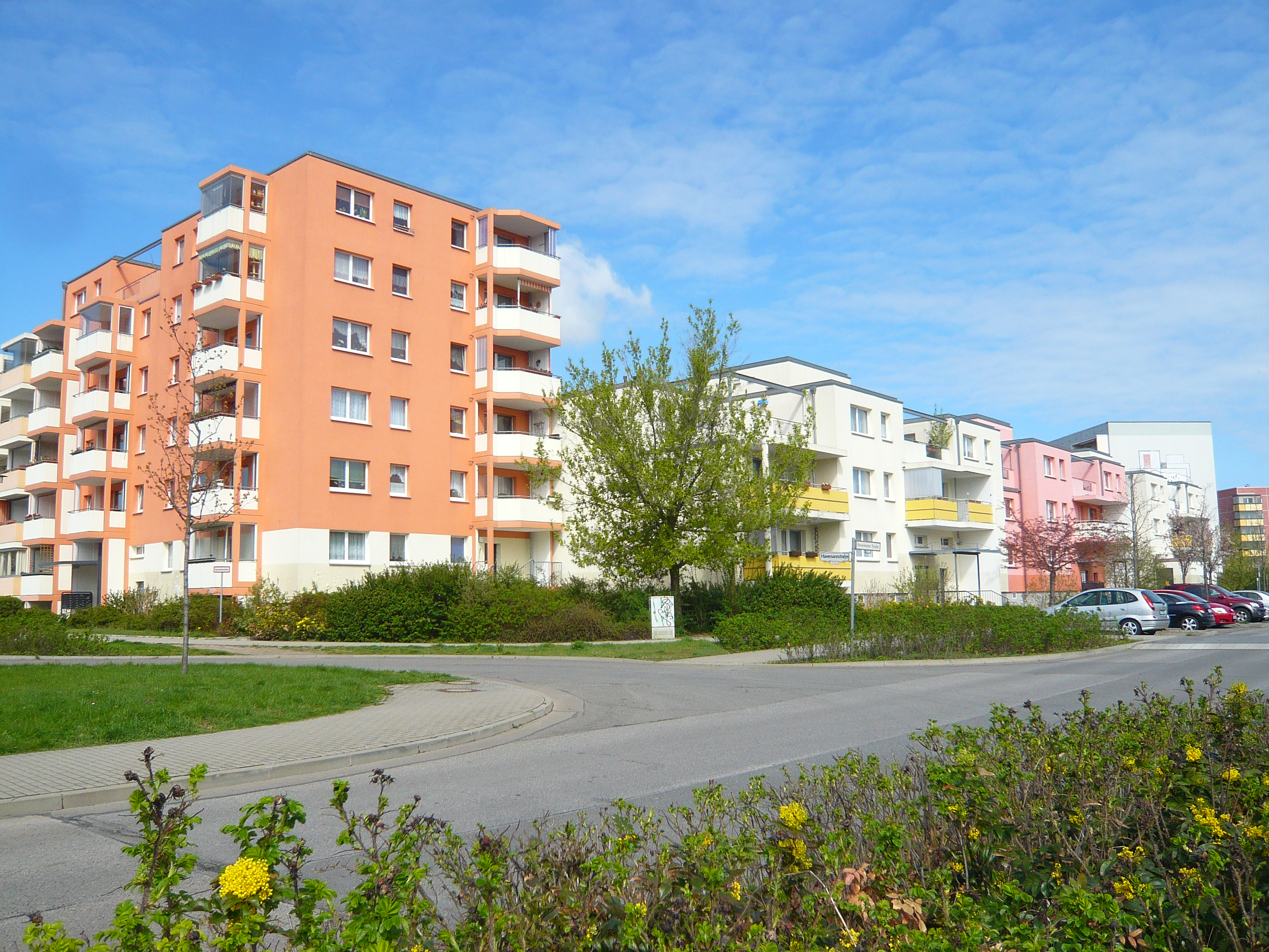 Ortsteil Berlin-Marzahn: Rosenbecker Straße